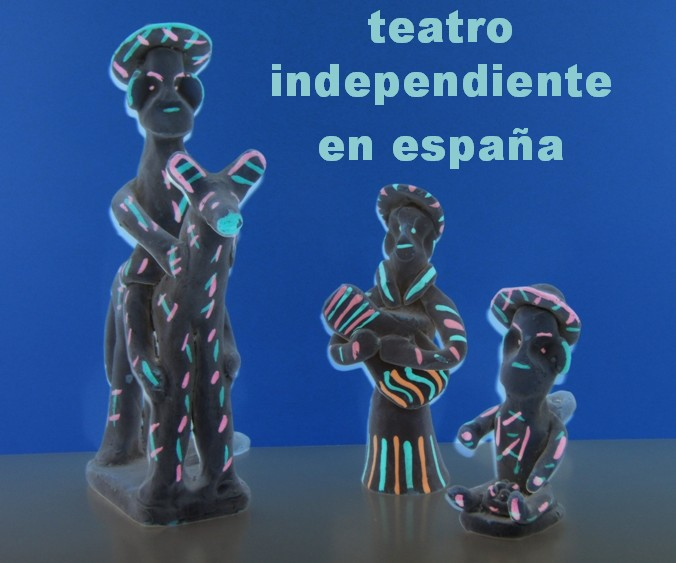 Composición logo para ilustrar la página Teatro independiente en España.